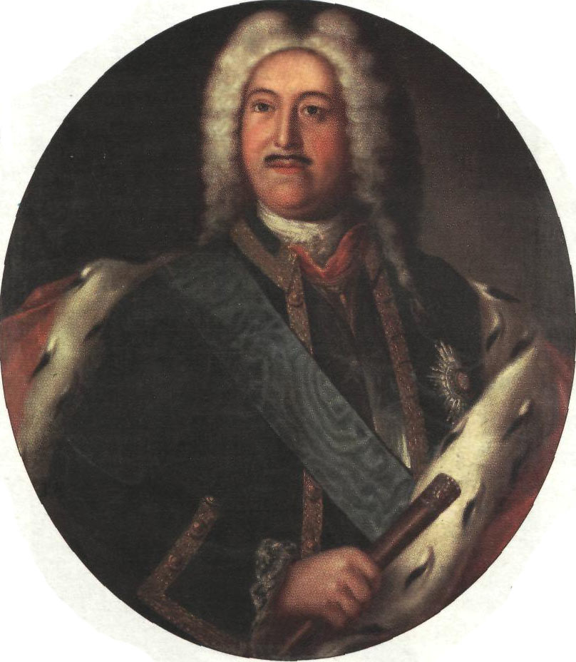 генерал-фельдмаршал князь Михаил Михайлович Голицын (1675-1730)